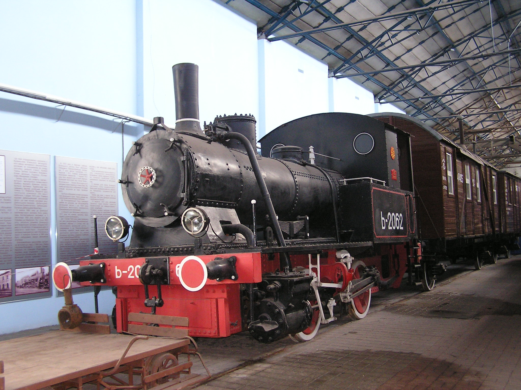 Музей истории и развития Донецкой Железной дороги. Ь-2062